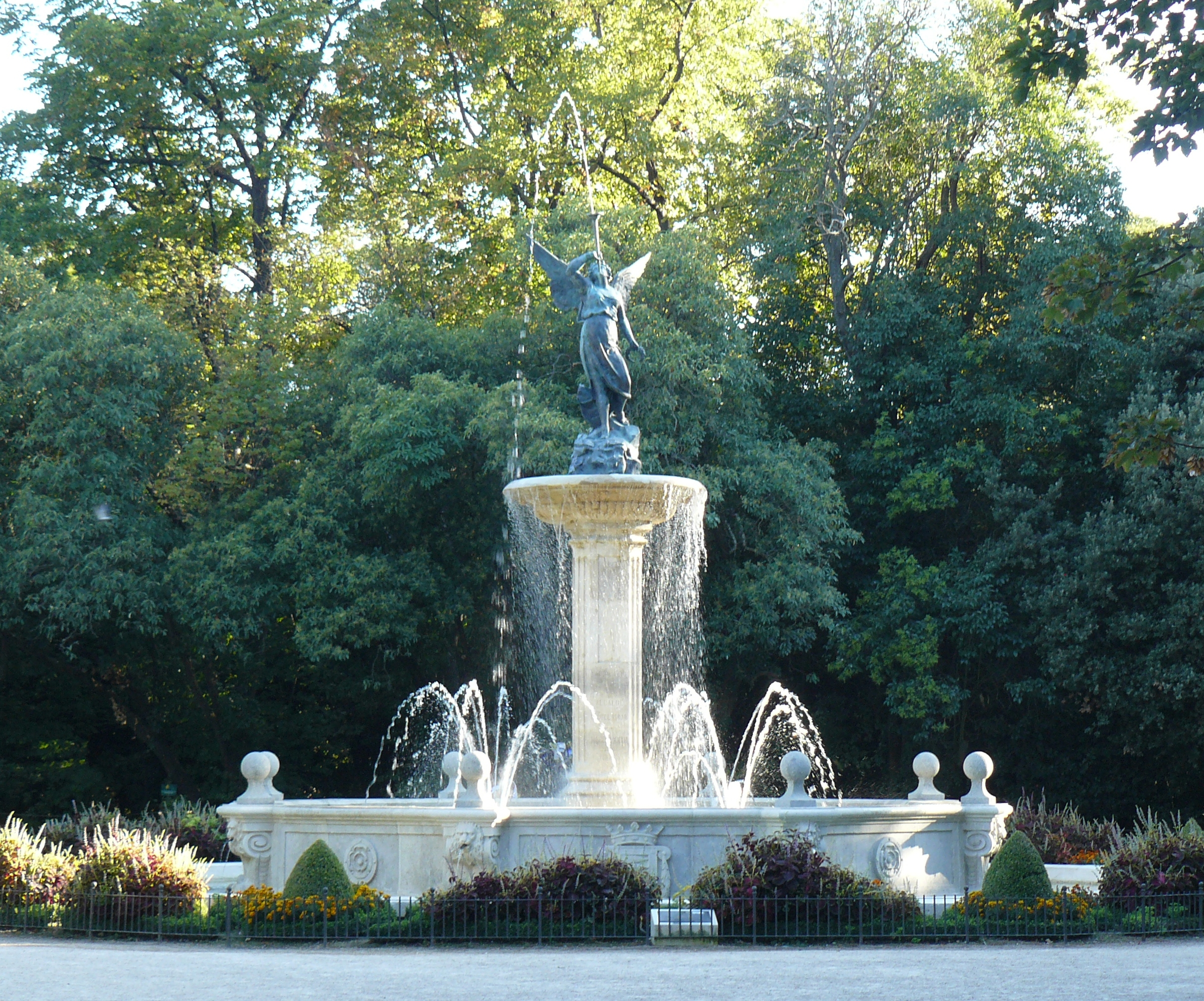 Parque del Campo Grande, Valladolid.